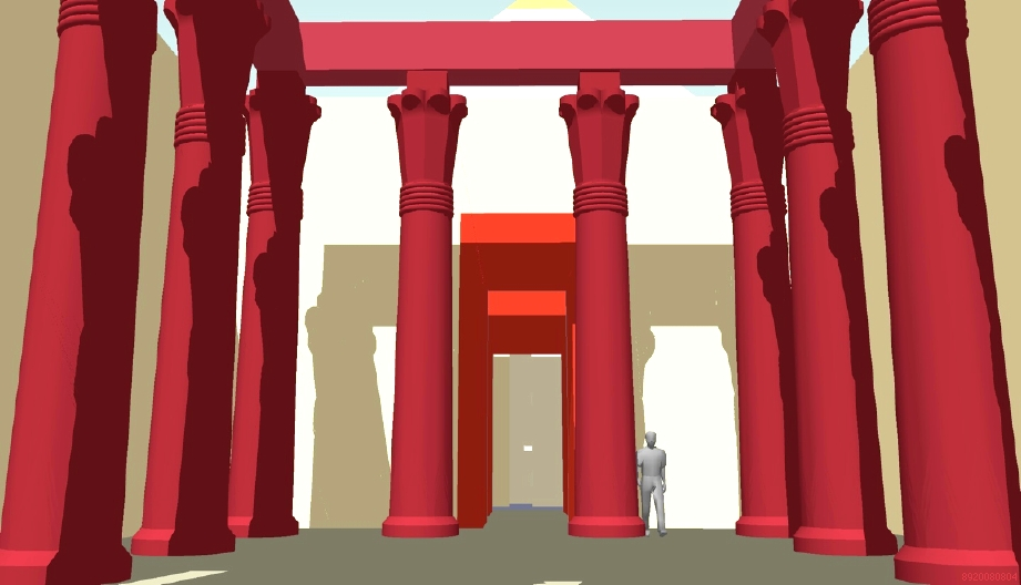 Essai d'élévation de la cour à colonnes palmiformes du temple haut de la pyramide de Djedkarê Isési